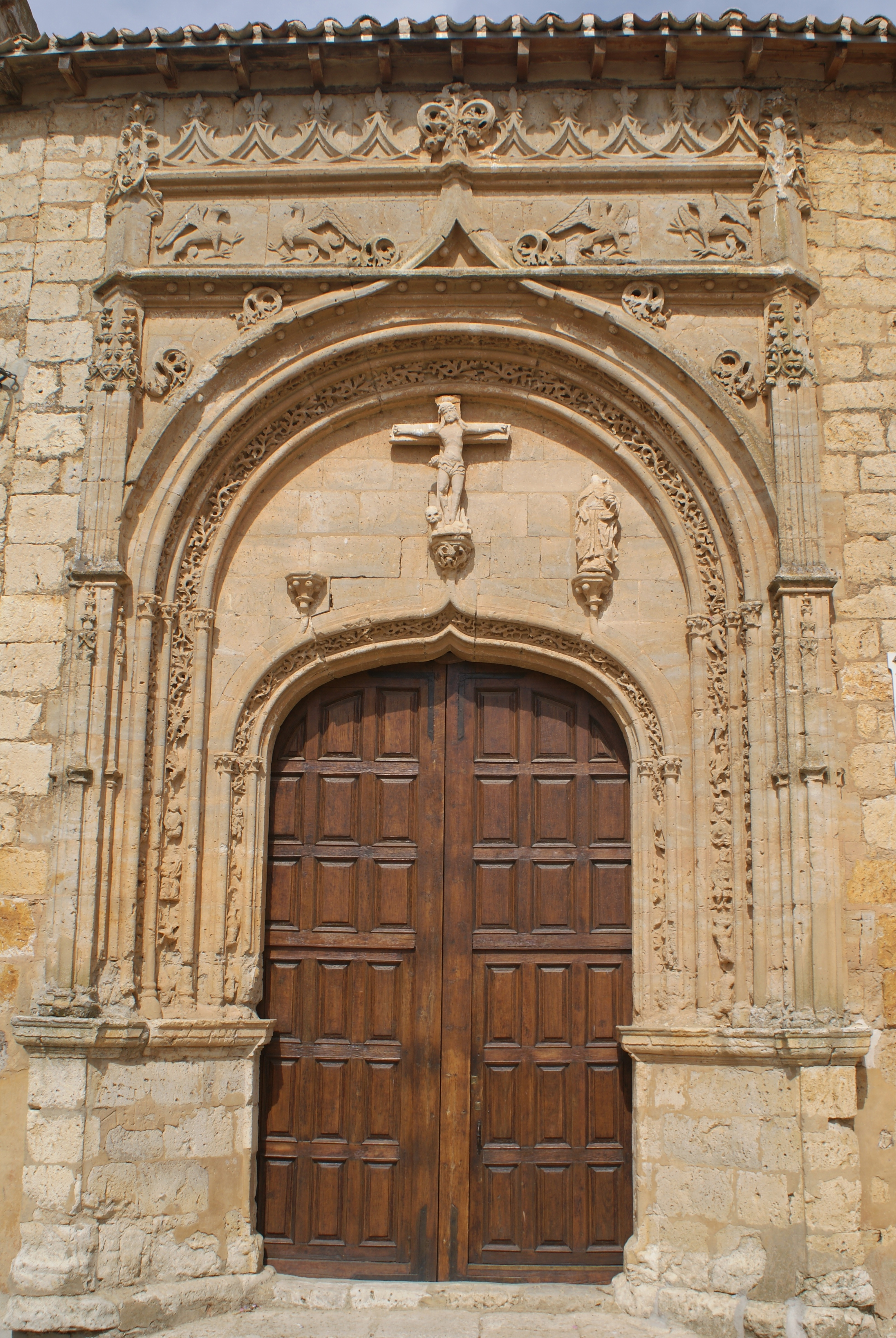 Iglesia de Nuestra Señora del Tovar en Meneses de Campos, provincia de Palencia (España). Declarada Bien de Interés Cultural.